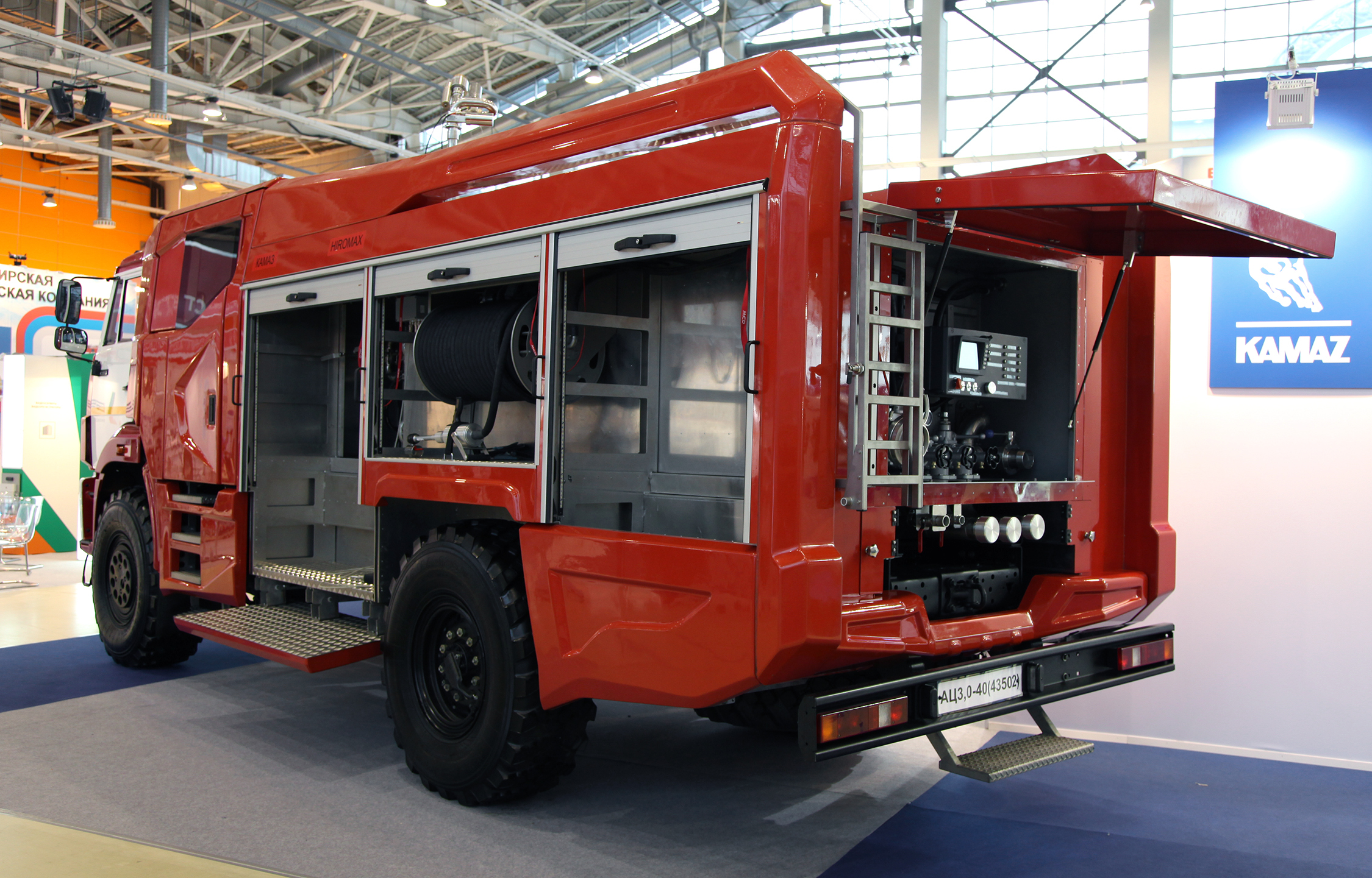 Автоцистерна пожарная АЦ 3,0-40 на шасси КАМАЗ-43502-45 (Fire fighting vehicle ATs 3,0-40 on KAMAZ-43502-45 chassis)